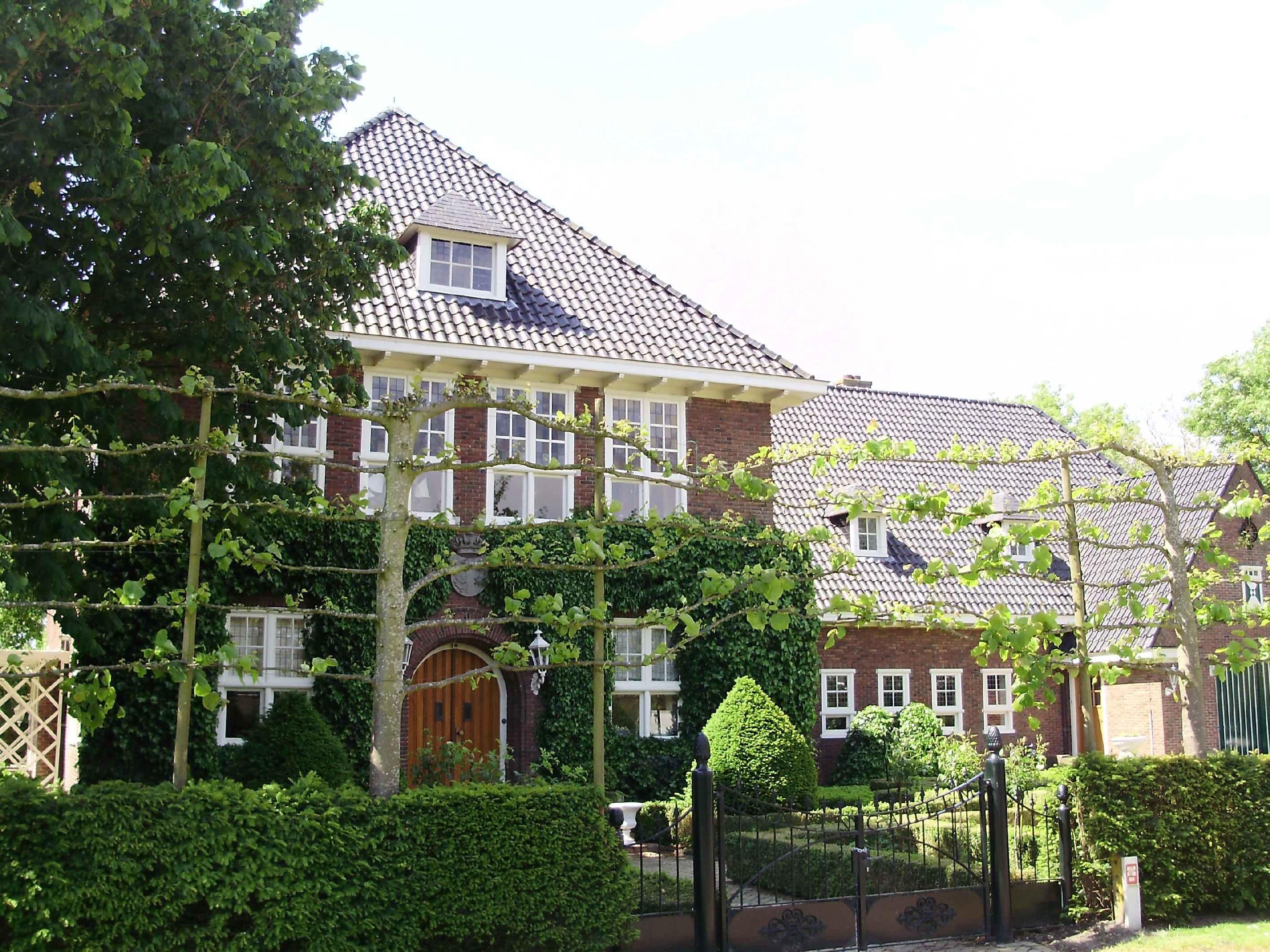 Het oude raadhuis van Baarderadeel in Mantgum (province of Friesland, the Netherlands)